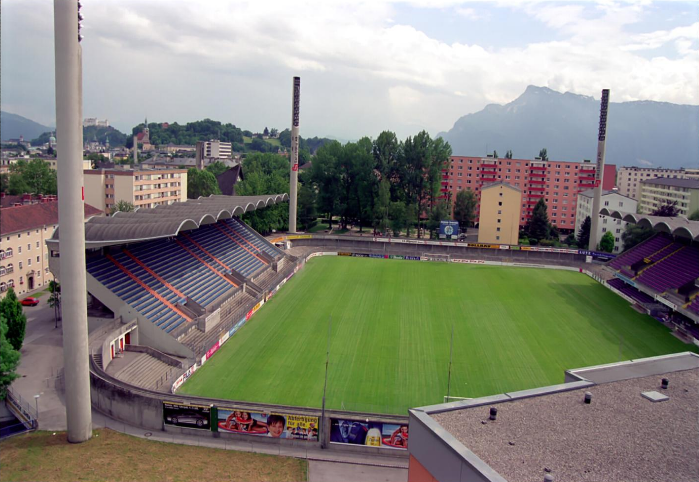 Das Lehener Stadion (mittlerweile abgerissen)